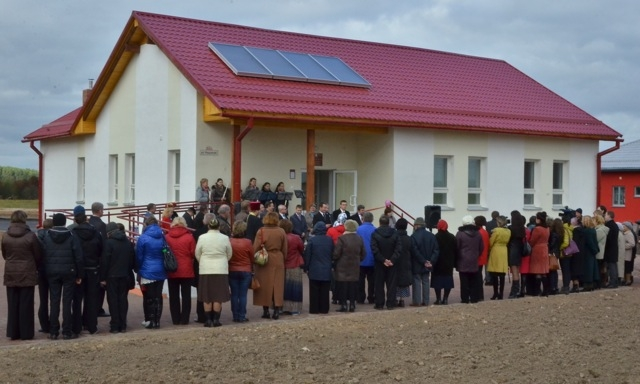 Einweihung des 2. Ambulanzzentrums 2013